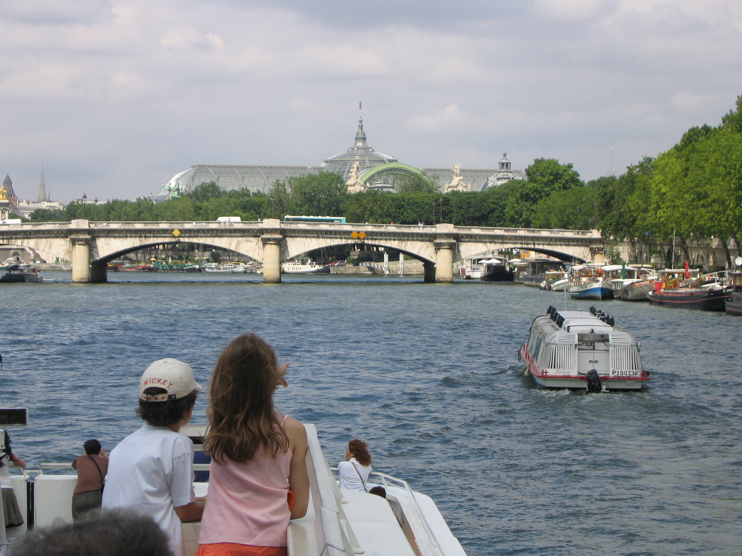 Le grand palais lors d'une promenade sur la Seine